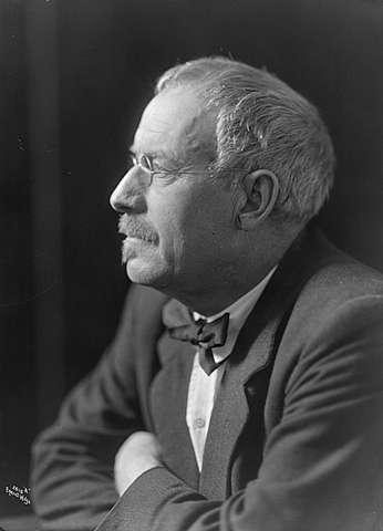 Norwegian painter Gudmund Stenersen